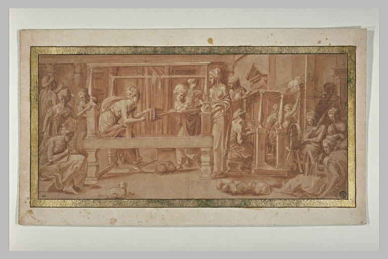 Pénélope et ses suivantes tissanttitle QS:P1476,fr:"Pénélope et ses suivantes tissant" label QS:Lfr,"Pénélope et ses suivantes tissant" label QS:Lru,"Франческо Приматиччо, гравюра, Пенелопа у ткацкого станка, Лувр, Париж."